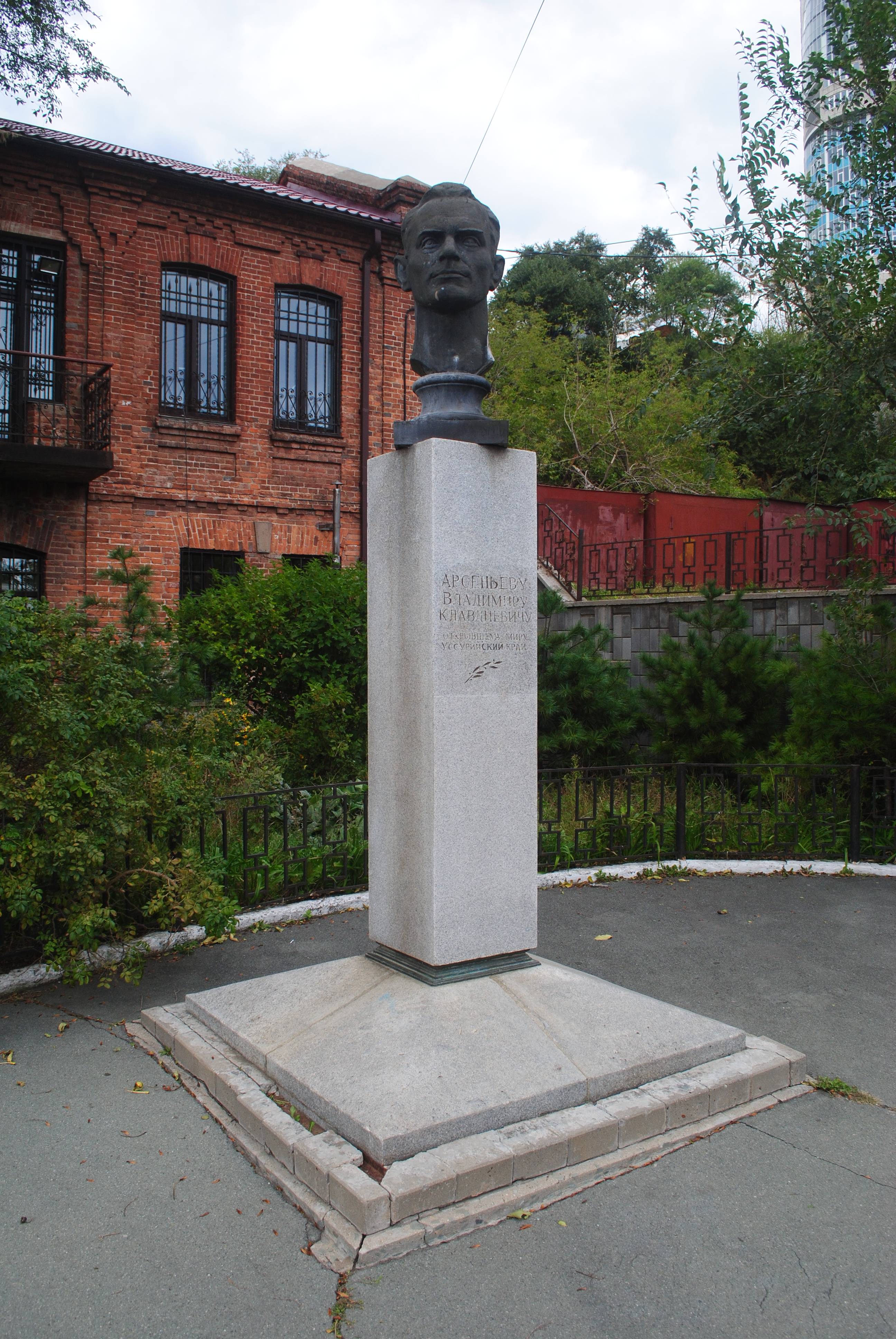 Дом, в котором жил исследователь Дальнего Востока В.К. Арсеньев: улица Арсеньева, 7-б, Владивосток, Приморский край